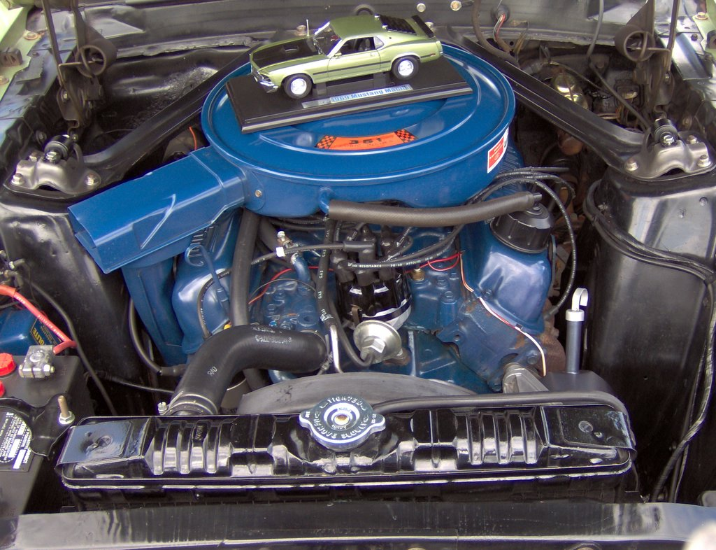 1969 Ford Mustang Mach 1 351 Windsor engine